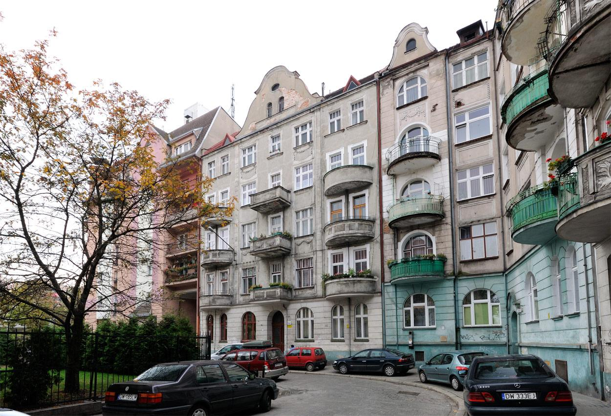 Kamienica numer 13.